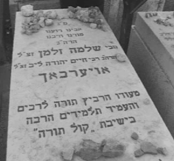 rabbi s.z. oerbach's tomb